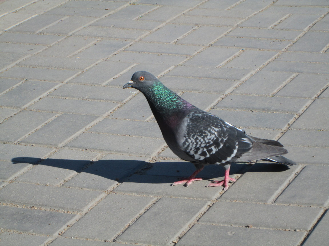 Сизый голубь (Омск, 2016)